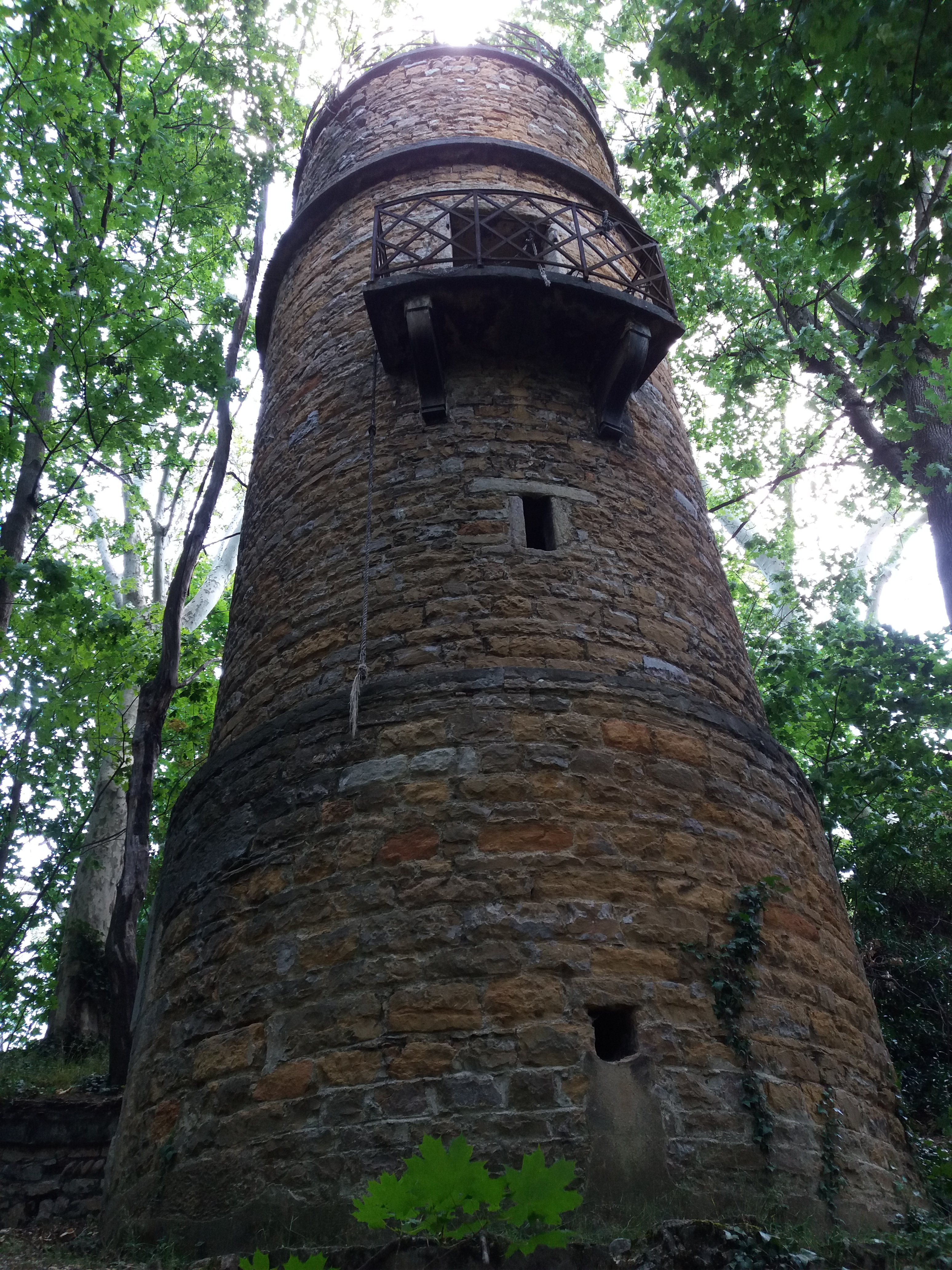 Tour et son balcon.